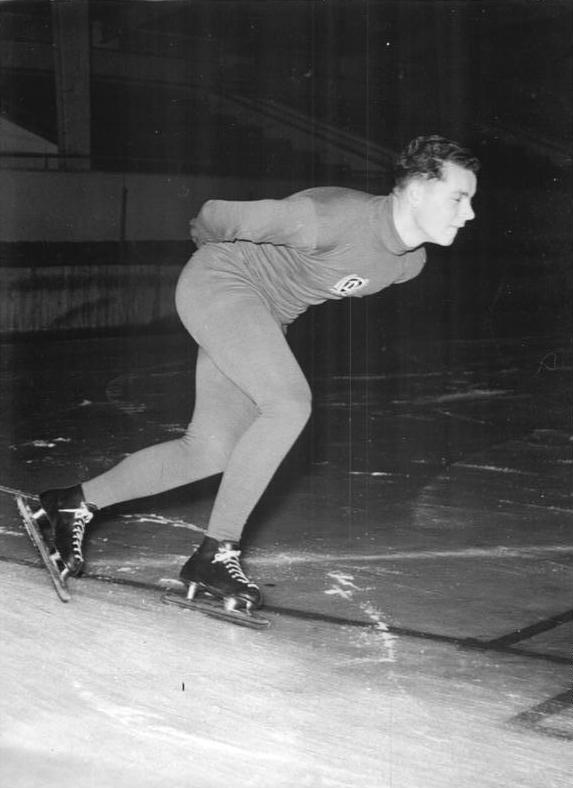 Helmut Kuhnert Zentralbild Funck-28.9.1955 Wjt-Qu- Zur Auszeichnung mit dem Titel "Meister des Sports" am 1.10.1955 vorgeschlagen: Helmut Kuhnert, Berlin, SC Dynamo, Sektion Eisschnellauf, beim Training in der "Werner-Seelenbinder-Halle", Berlin. Achtung, Redaktionen: Zur Veröffentlichung frei nach offizieller Auszeichnung. Abgebildete Personen: Kuhnert, Helmut: Eisschnelläufer, Olympiateilnehmer 1956, Trainer, DDR